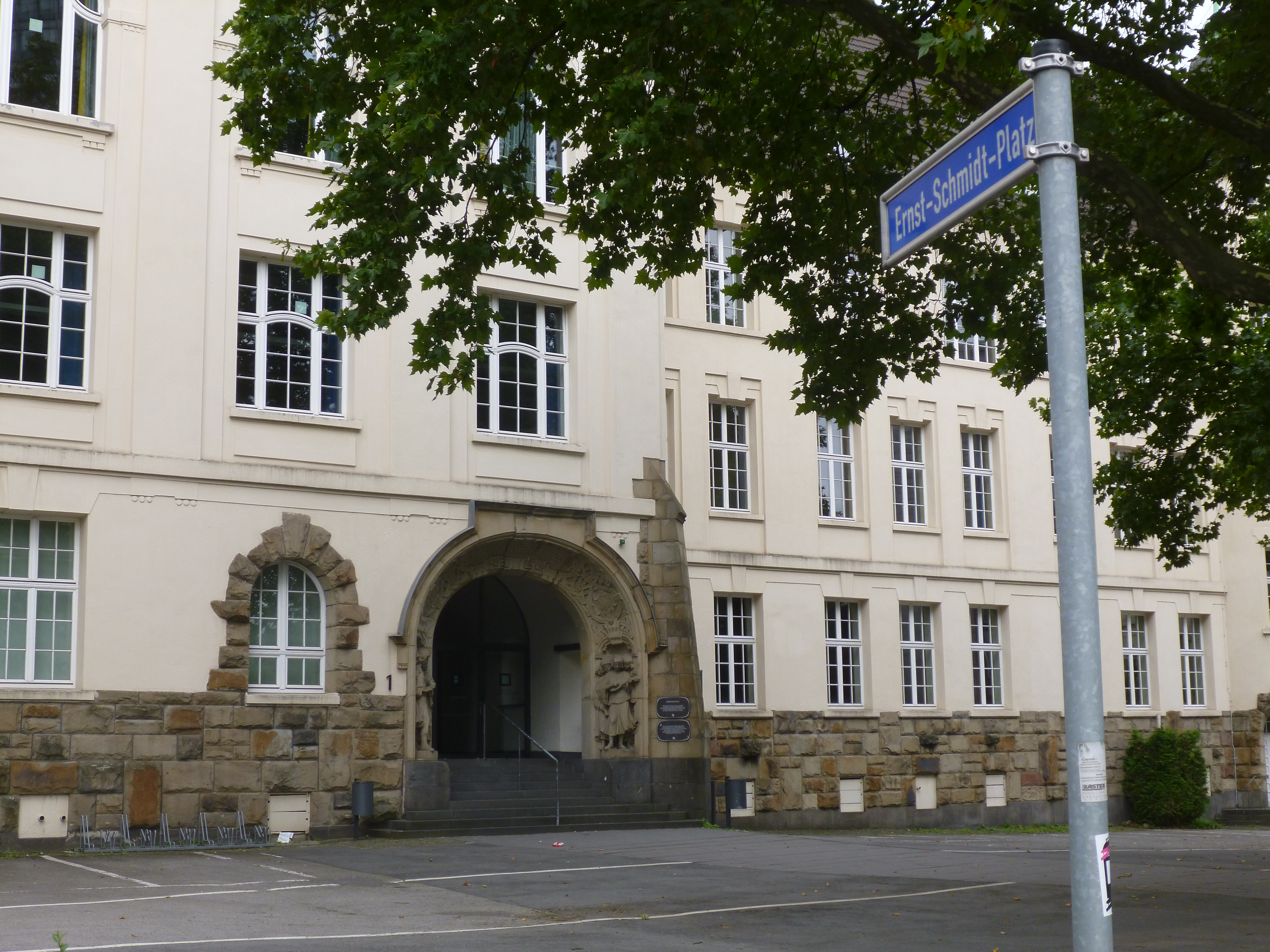 Ernst-Schmidt-Platz Essen 2015 Ernst Schmidt (Autor)